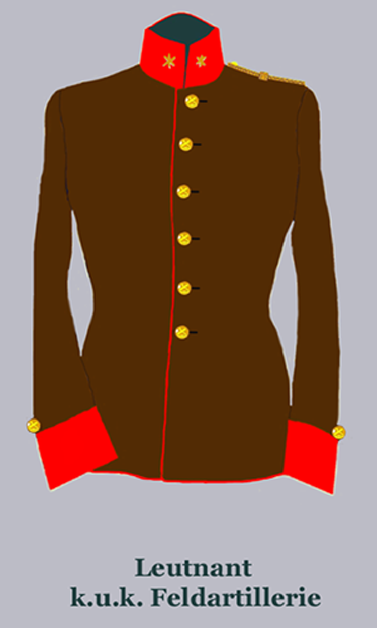 Offiziers-Waffenrock der k.u.k. Feldartillerie nach 1908 (Details und Farben sind entnommen der Egalisierungsvorschrift des k.u.k. Kriegsministerium für die k.u.k. Armme, die k.k. Landwehr, die k.u. Landwehr, die verbundenen Einrichtungen und das Corps der Militär-Beamten von 1867 - Ausgabe von 1912)